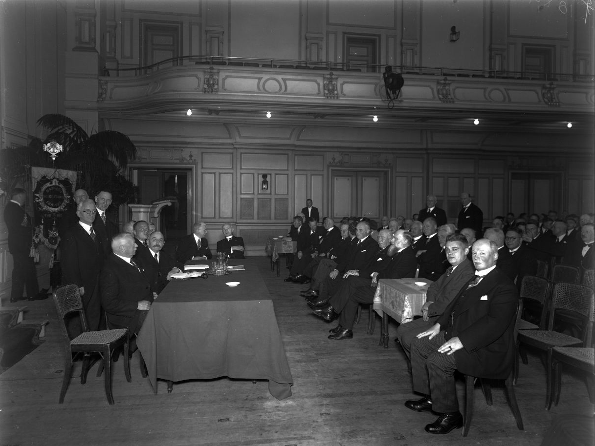 Beeld van de herdenkingsbijeenkomst van het 150-jarig bestaan van de M.S.G., gehouden in de Stadsgehoorzaal. Leiden, 1935.